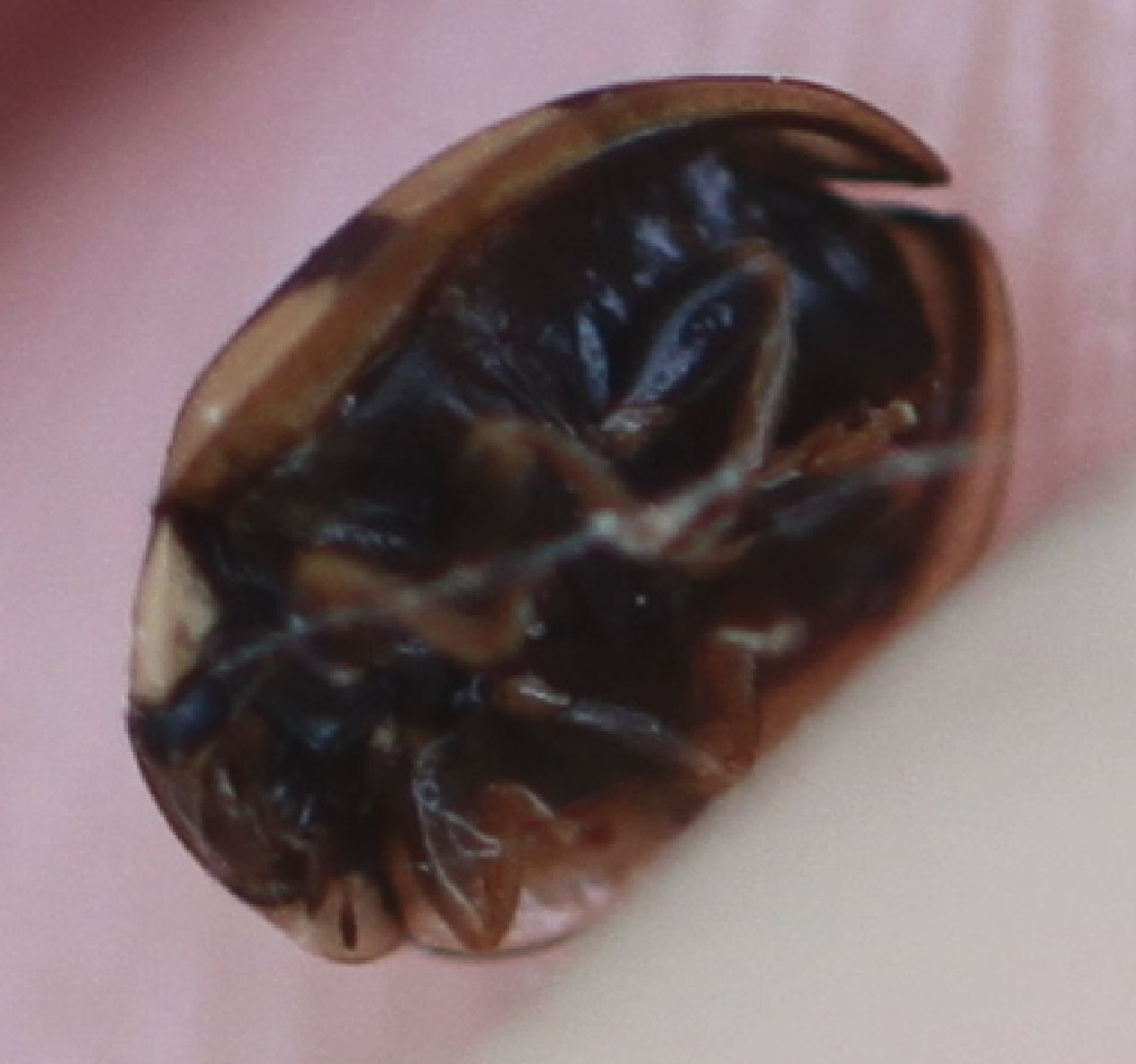 Ventralansicht von Marienkäfer Oenopia lyncea lyncea, am 2. Juli 2019 an der Côte d’Azur